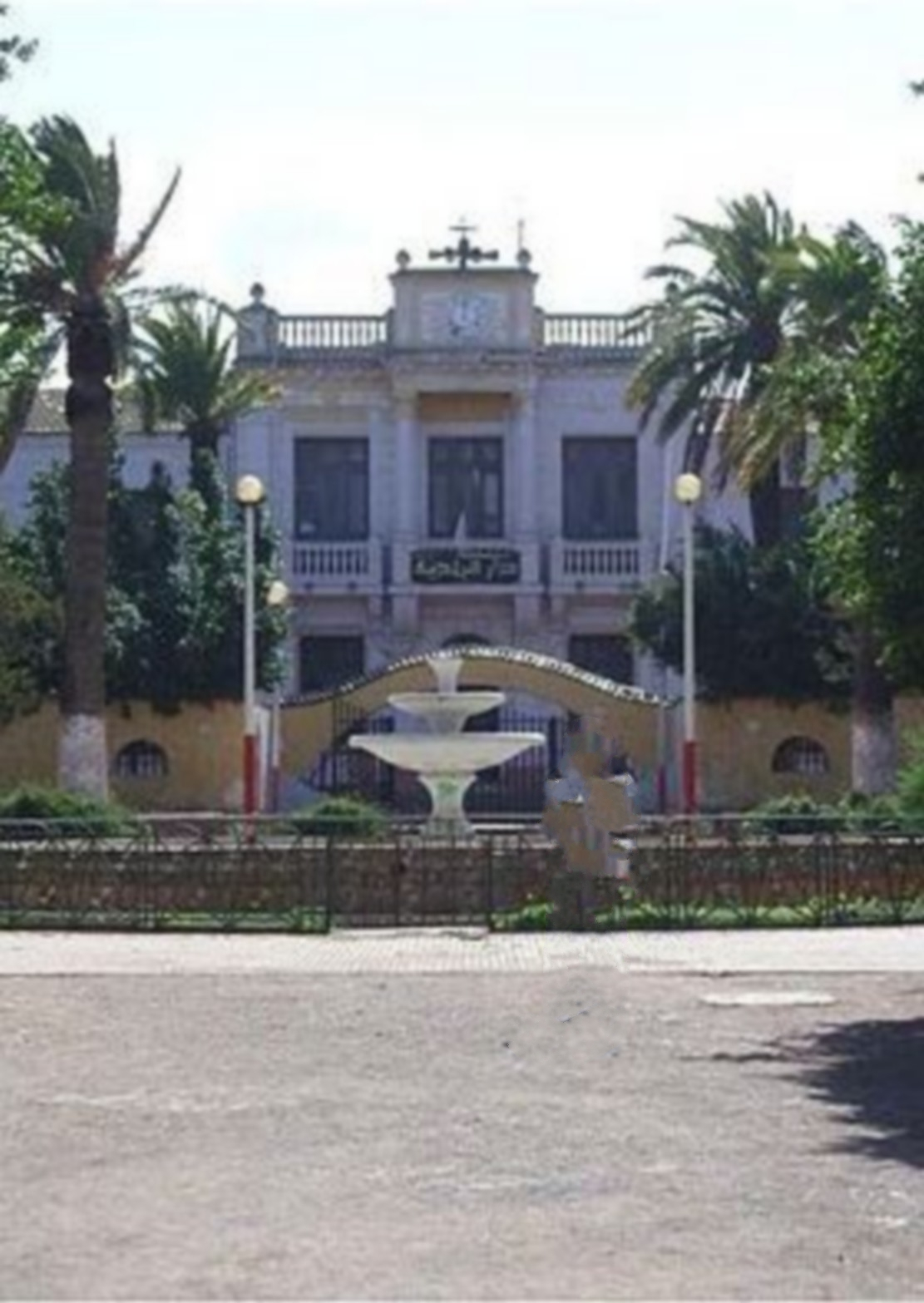 CHAABAT EL LEHAM